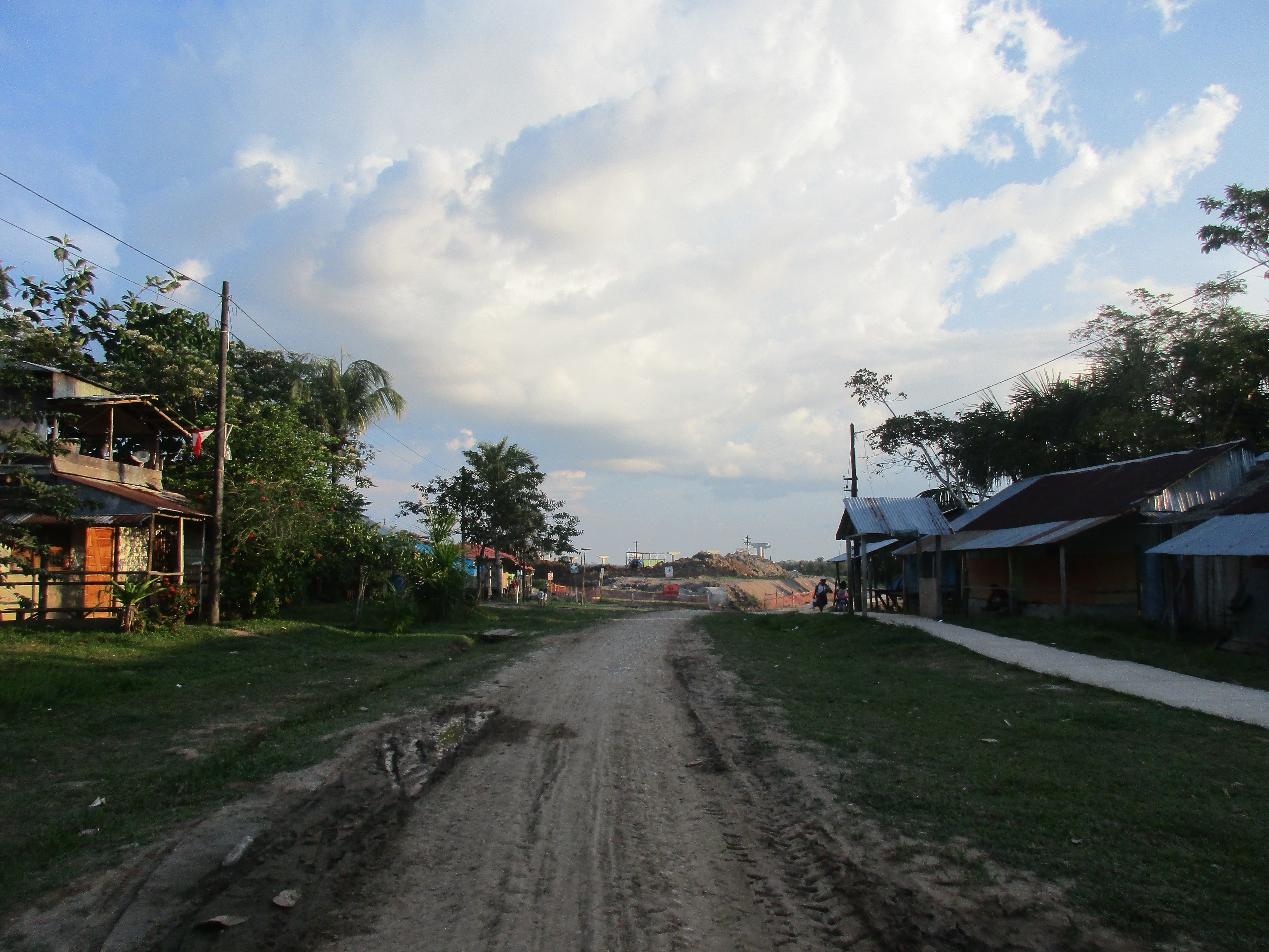 Santo Tomás del Nanay frente a Bellavista-Nanay.